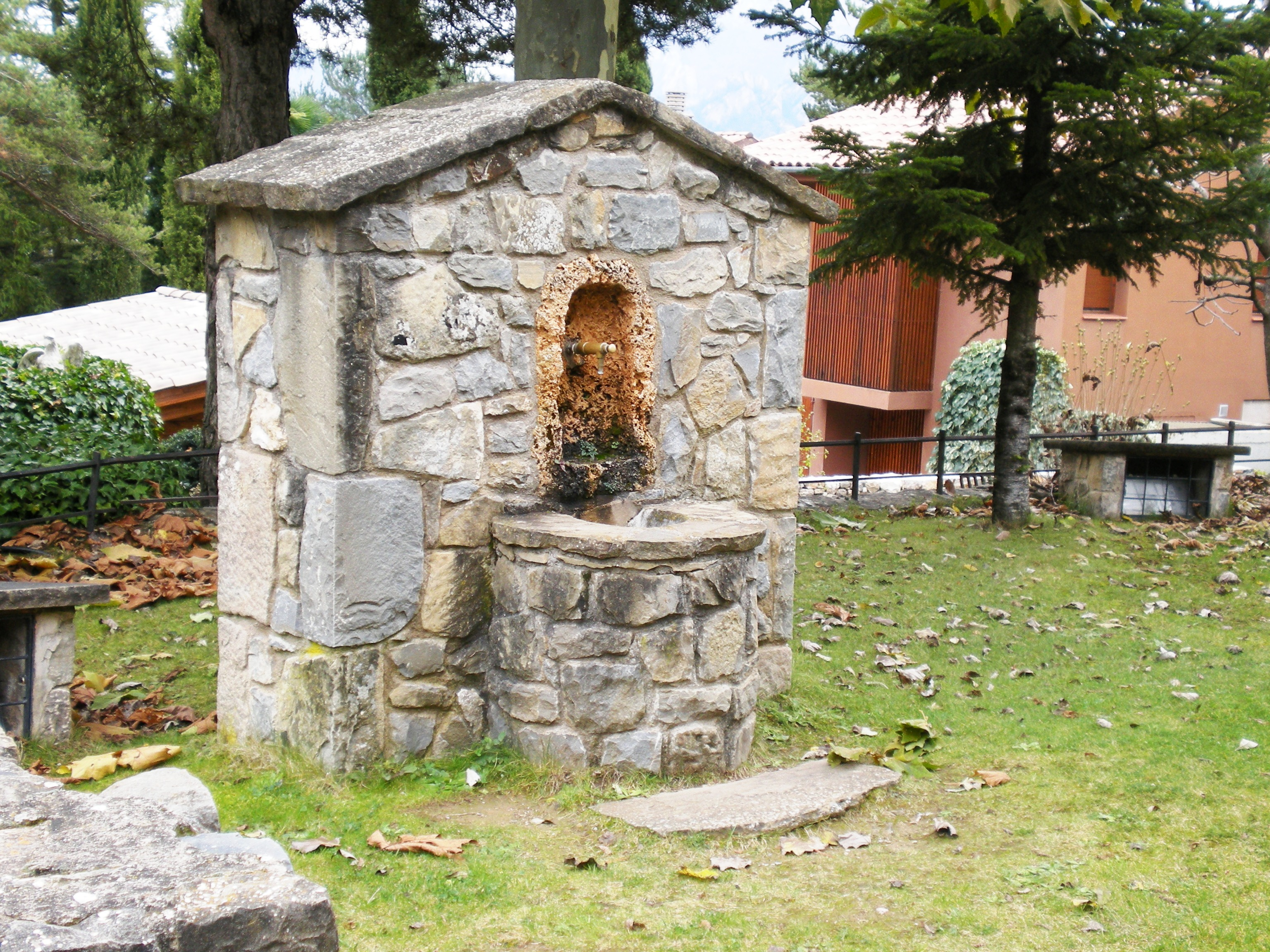 Font de la Santa Creu dels Ollers, al terme de Sant Llorenç de Morunys (Solsonès)